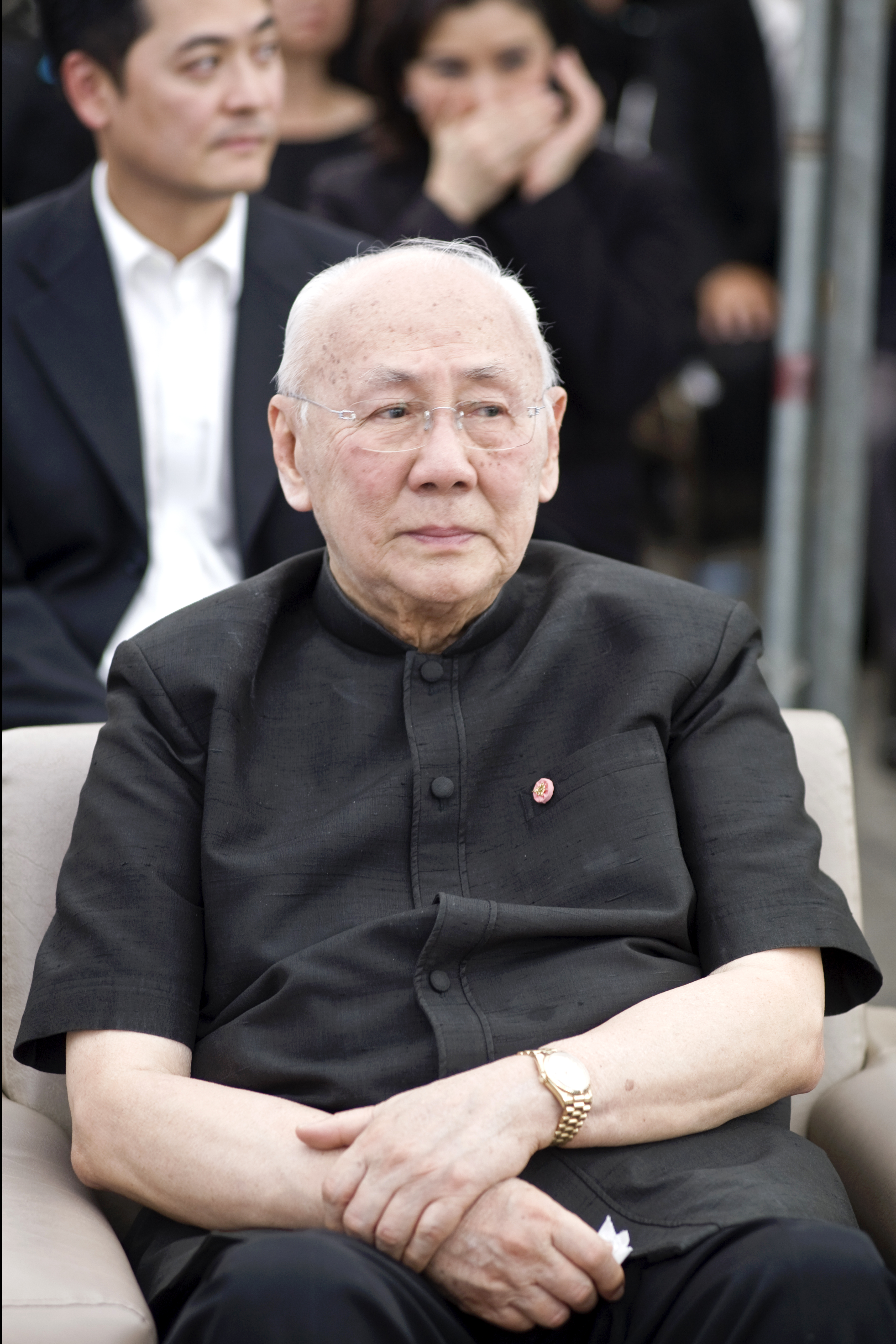 พิชัย รัตตกุล / นายกรัฐมนตรีเข้าร่วมพิธีฝังศพ นายเล็ก นานา อดีตเลขาธิการ และผู้ร่วมก่อตั้งพรรคประชาธิปัตย์ โดยพระบาทสมเด็จพระเจ้าอยู่หัวฯ ทรงพระราชทานดินฝังศพ นายเล็ก นานา ณ มัสยิด นูรุ้ลมู่บีน 1เมษายน 2553 (The Official Site of The Prime Minister of Thailand Photo by พีรพัฒน์ วิมลรังครัตน์)